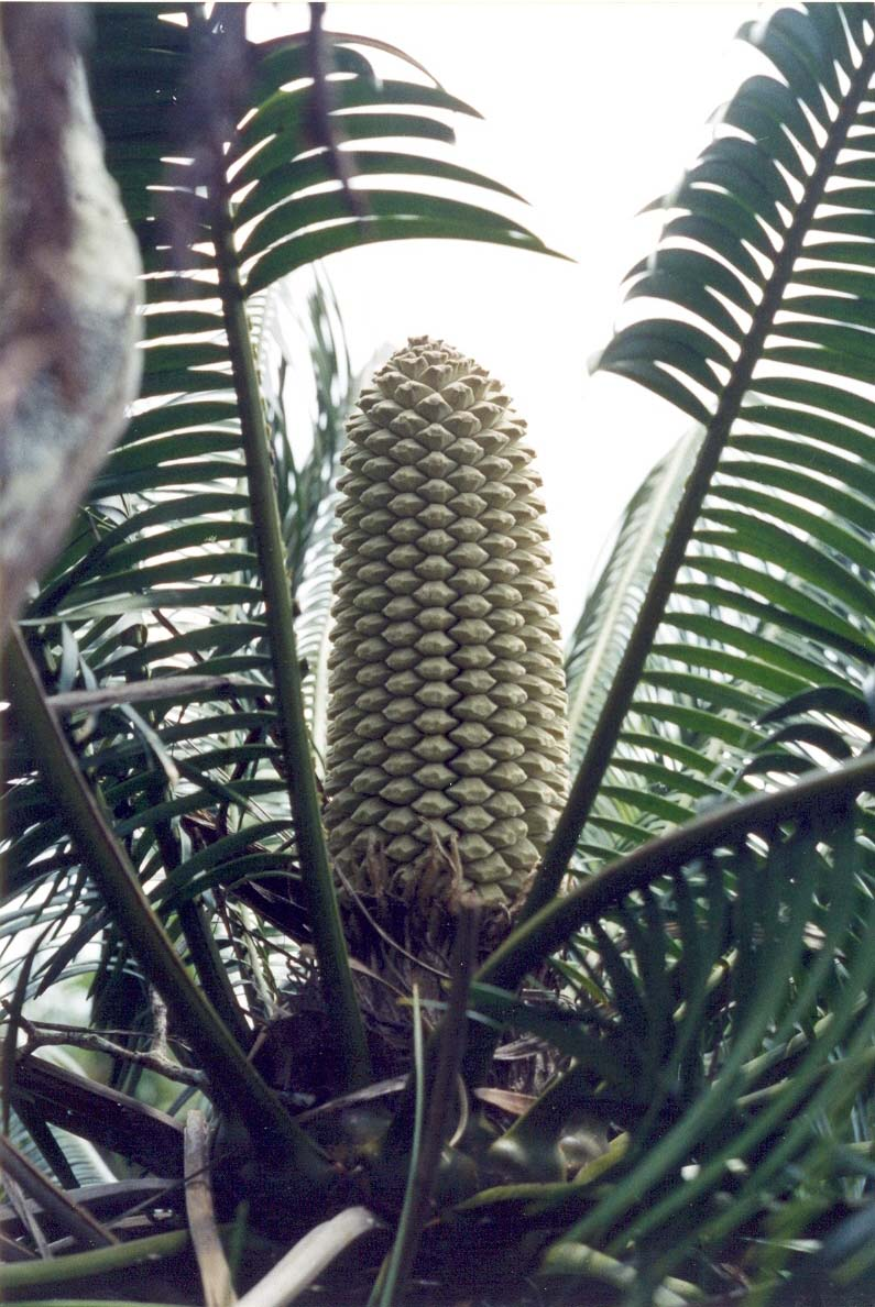 Cono femenino receptivo de Microcycas calocoma, Parque Nacional Viñales, Pinar del Río, Cuba. Escaneada de copia original.